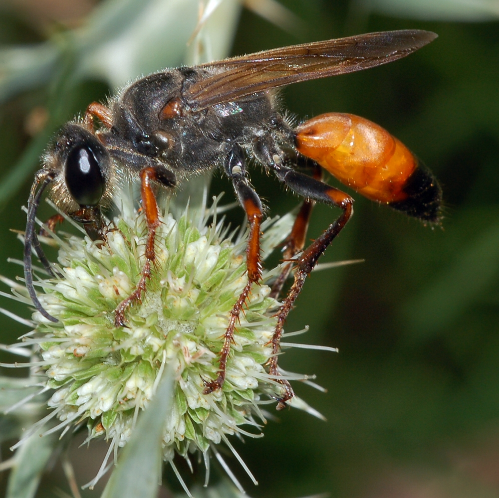 Sphecidae: Sphex funerarius Gussakovskij, 1934, Heuschreckensandwespe, Schwanheimer Düne, Frankfurt am Main, Deutschland, Germany